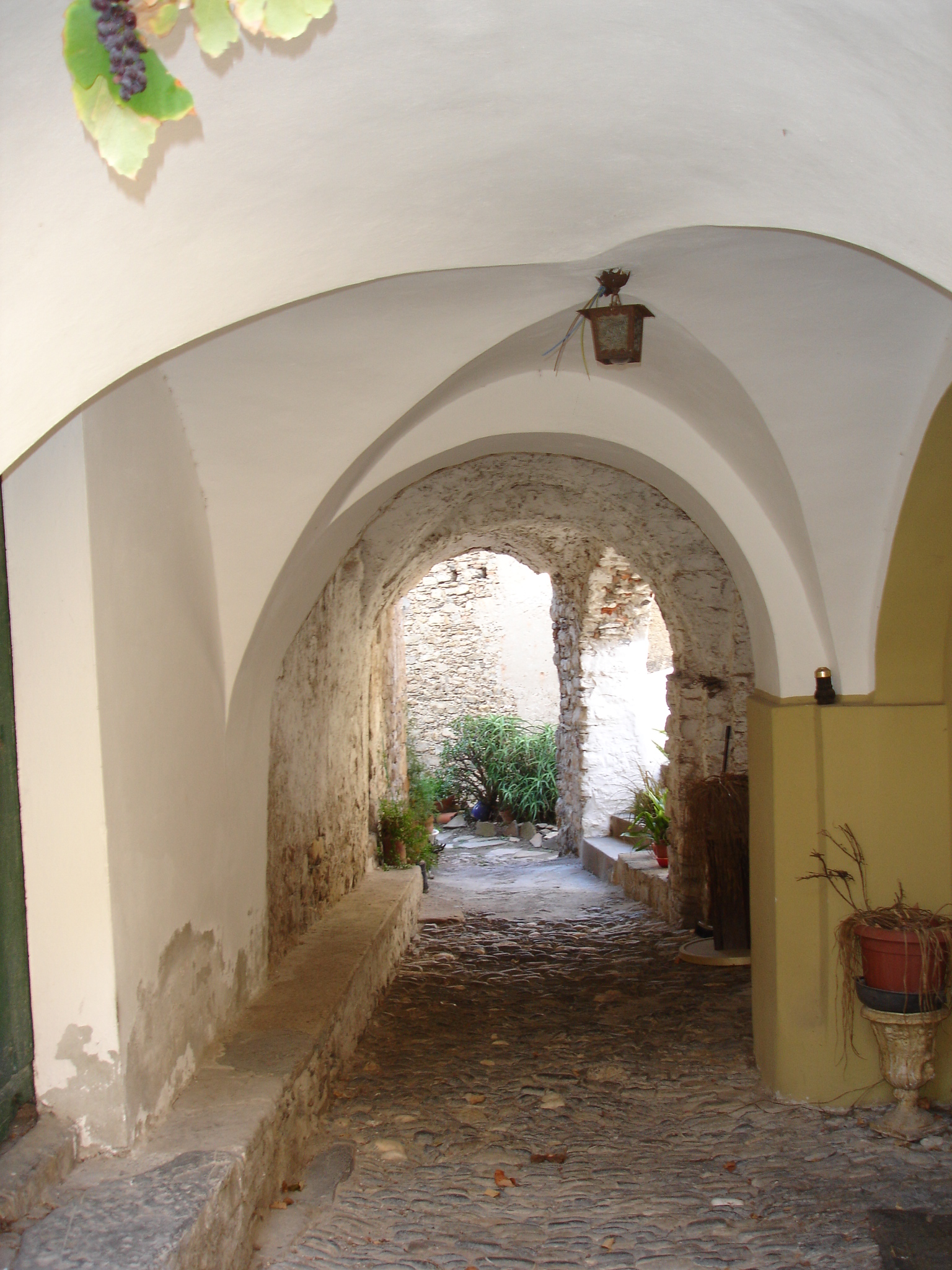 Autore Tony Frisina, 23 agosto 2007, Diano San Pietro (IM) - Una via del vecchio centro storico.